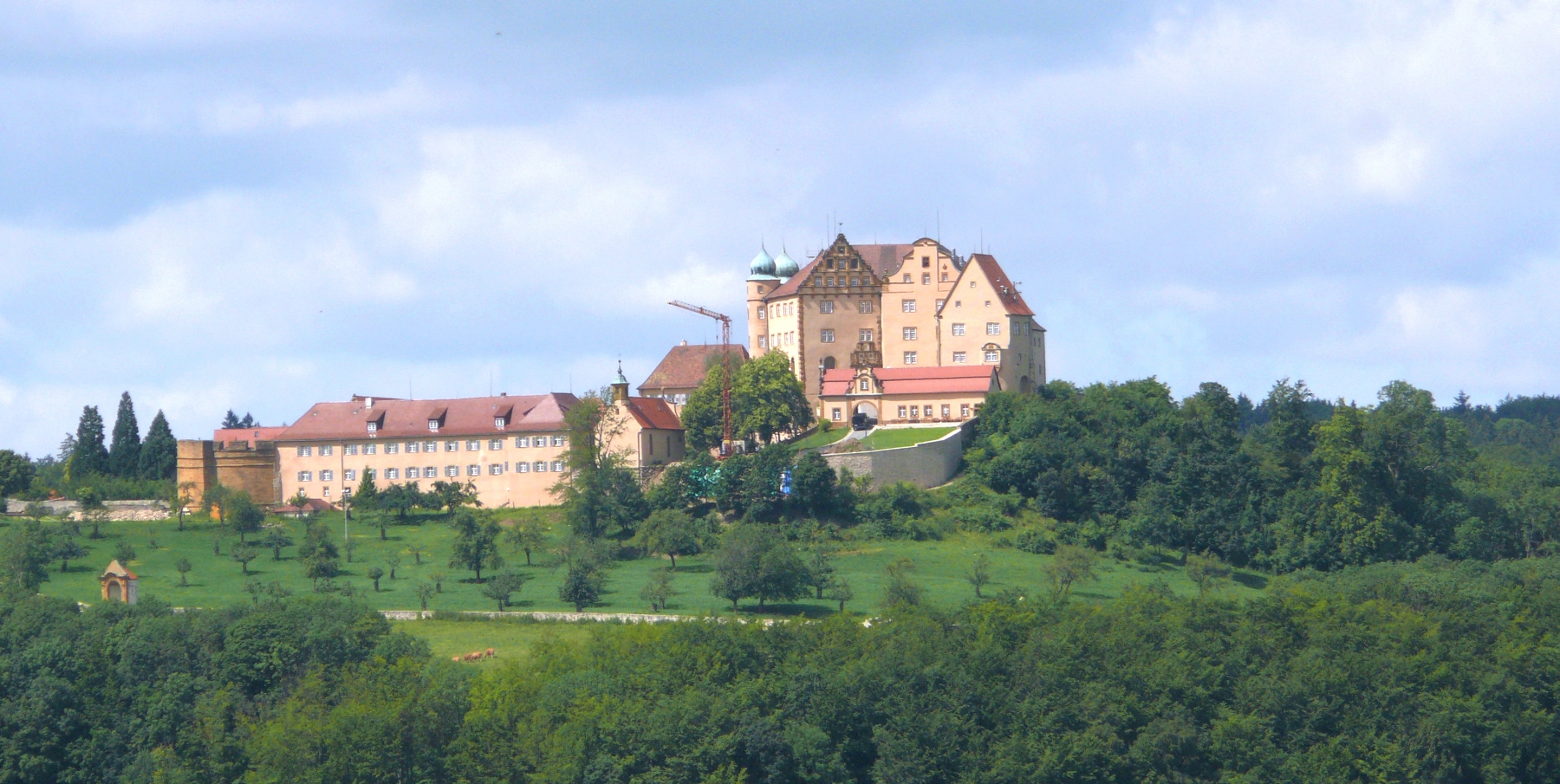 Kapfenburg near Lauchheim, Germany